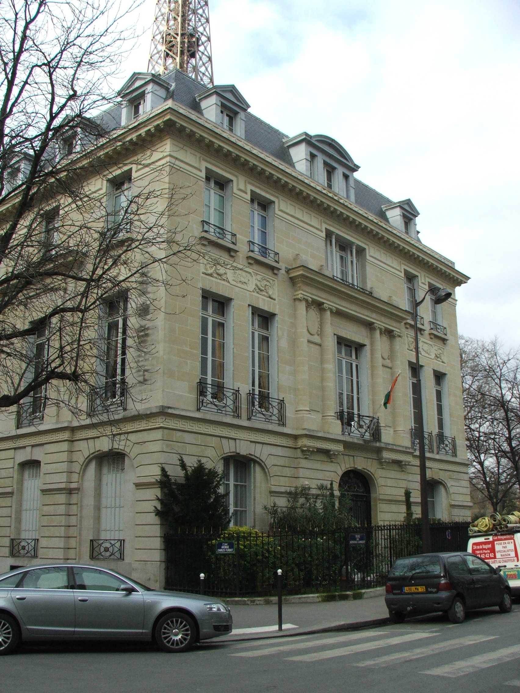 Résidence de l'ambassadeur d'Inde en France, au croisement de l'avenue Charles-Floquet et de la rue du Général-Lambert, Paris 7e Residence of the Indian Ambassador to Paris, as viewed from Avenue Charles-Floquet and Rue du Général-Lambert, Paris 7e. The Indian embassy is at 15 Rue Alfred-Dehodencq, Paris 16e.